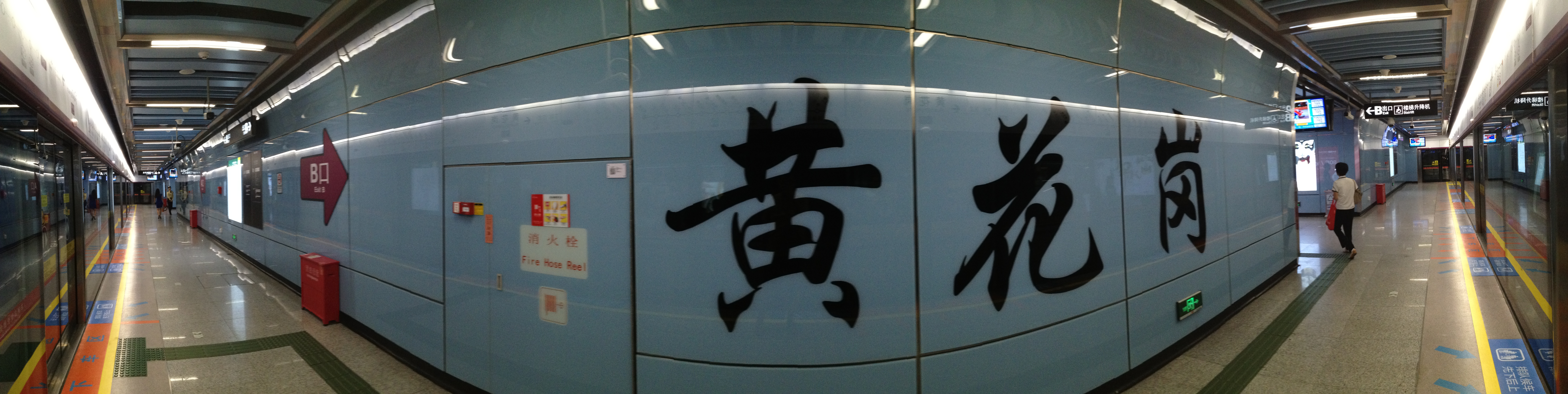 广州地铁黄花岗月台全景图